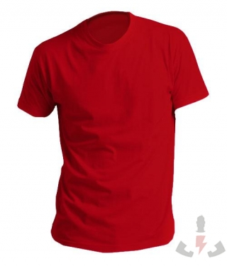 Camiseta de manga corta de color rojo. Camisetas 100% algodón